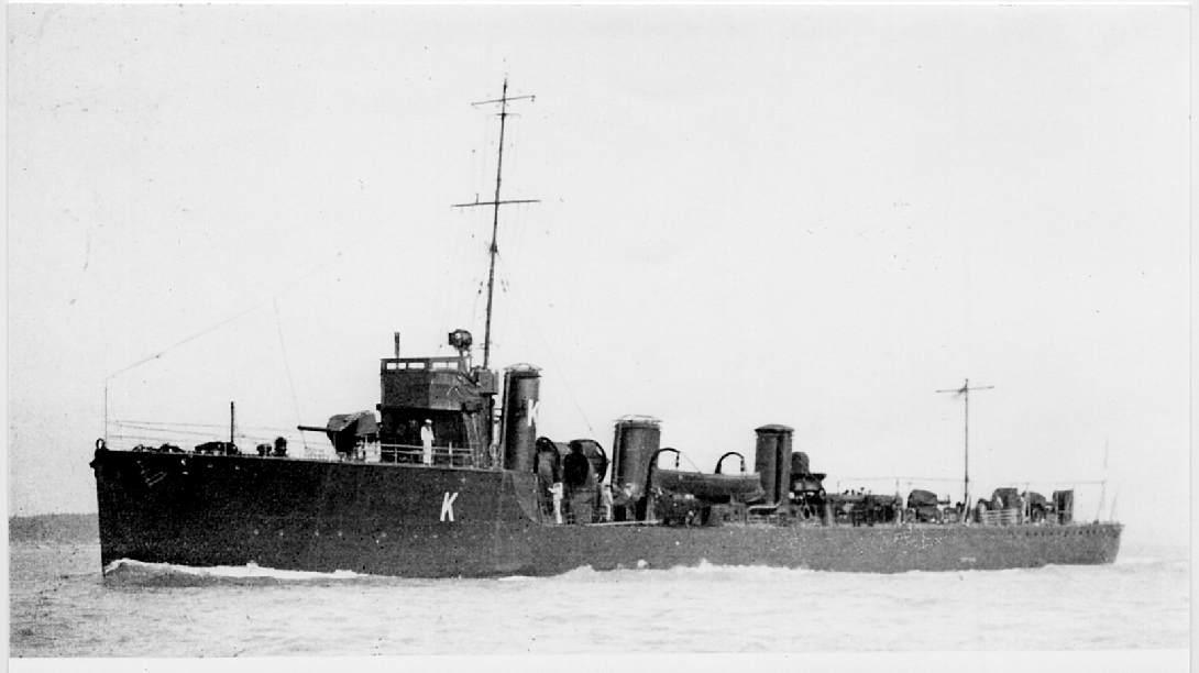 Der britische Zerstörer SHARK der Acasta-Klasse